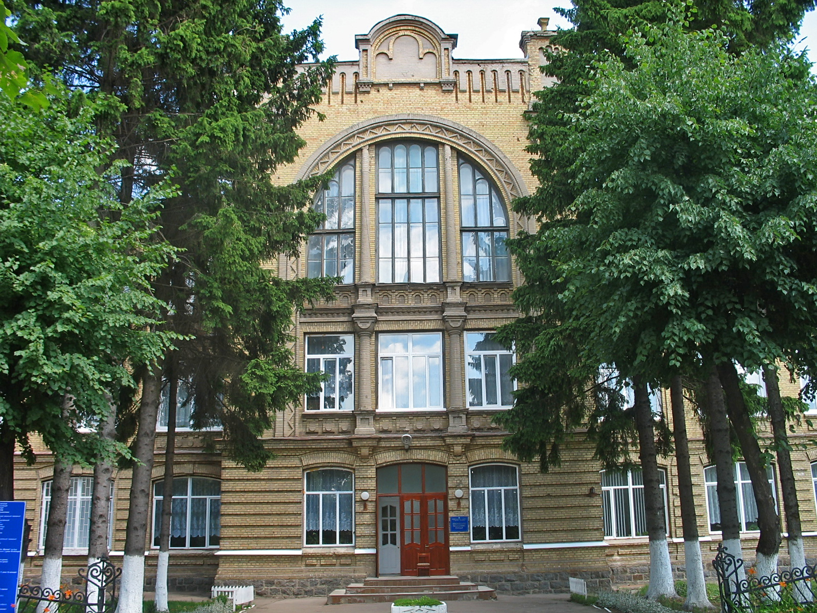 Колишнє комерційне училище, Бердичів, вул. К.Лібкнехта, 53/1